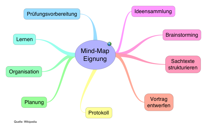 Dies Mind-Map beschreibt in einer Mind-Map wozu Mind-Maps ua. geeignet sind.